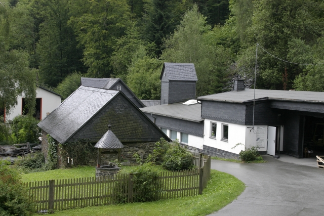 Lotharheil